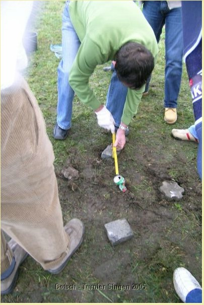 Bootsch-Turnier Singen 2005, Ausmessen des Gewinners